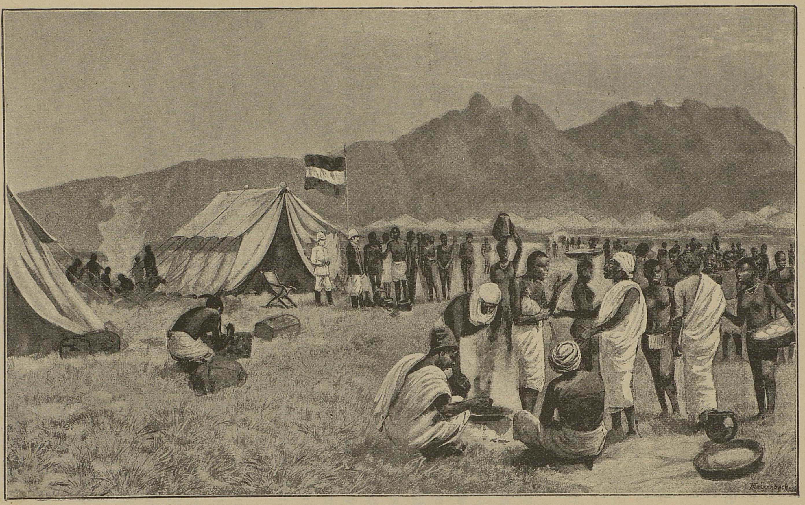 Illustrasjon hentet fra boken "Den tyske Emin Pascha-Expedition" av Peters, Carl og utgitt av Forlagsbureauet (Kjøbenhavn, 1891)